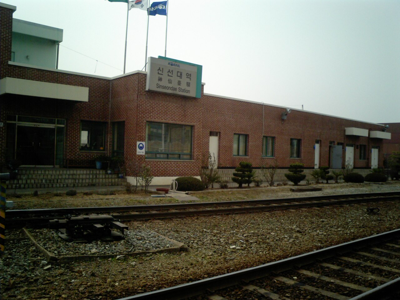 우암선 신선대역